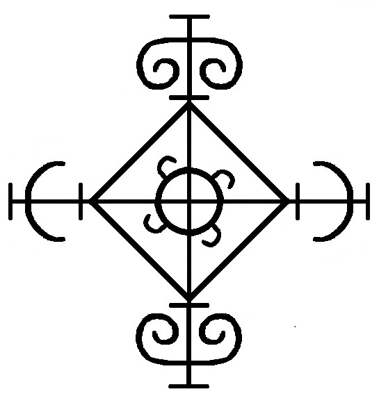 тамга(герб) родов Плиевых и Мальсаговых из башенного комплекса Таргим